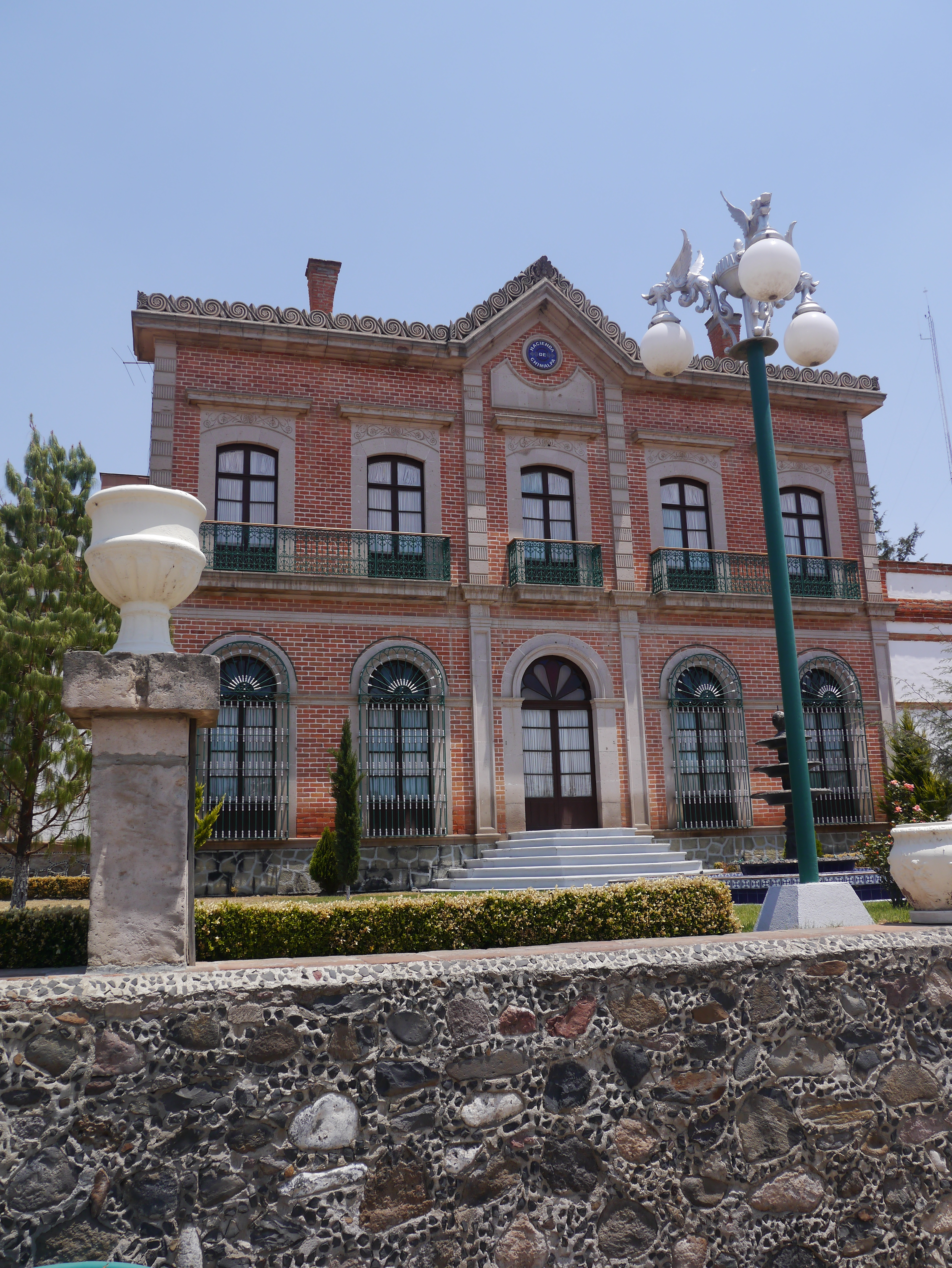 Hacienda Pulquera Chimalpa, Apan, Hidalgo, Mexico